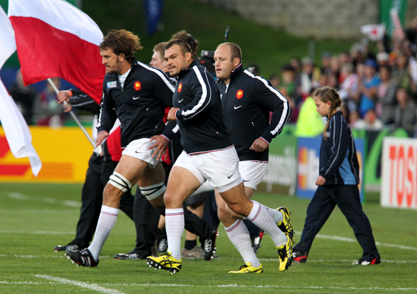 Rugby World Cup 2011 France Japon. Au centre : Nicolas Mas.